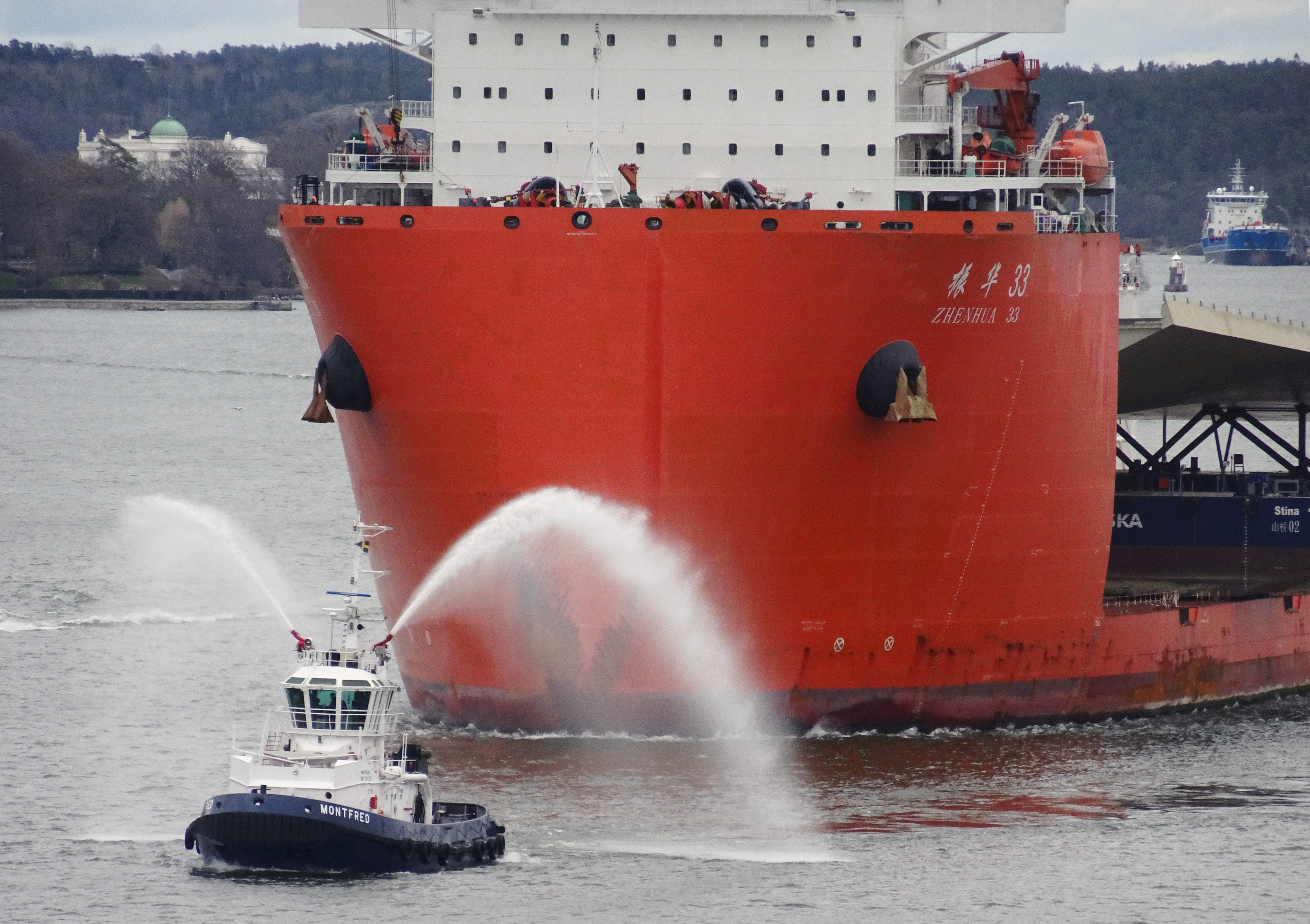 Guldbron på Stockholms inlopp, vy från Ersta